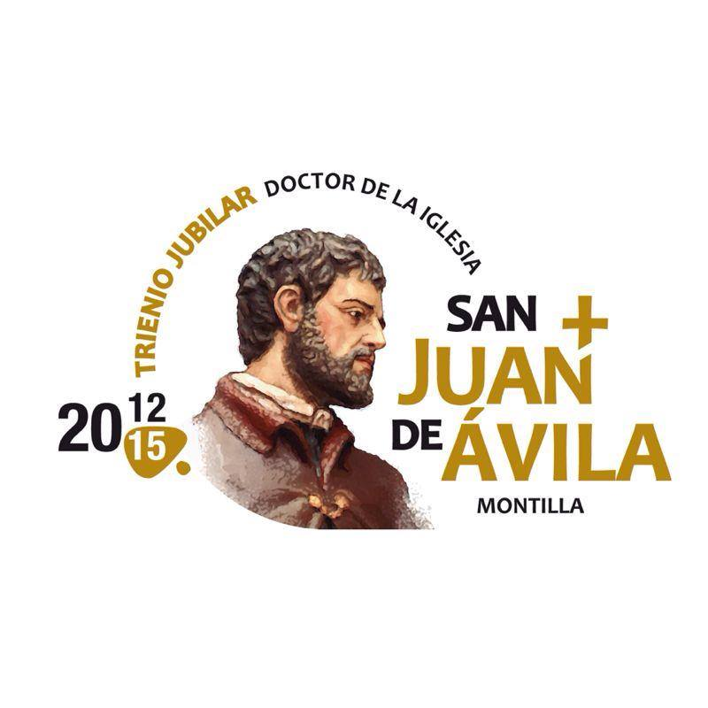 Logo Trienio Jubilar Avilista en Montilla